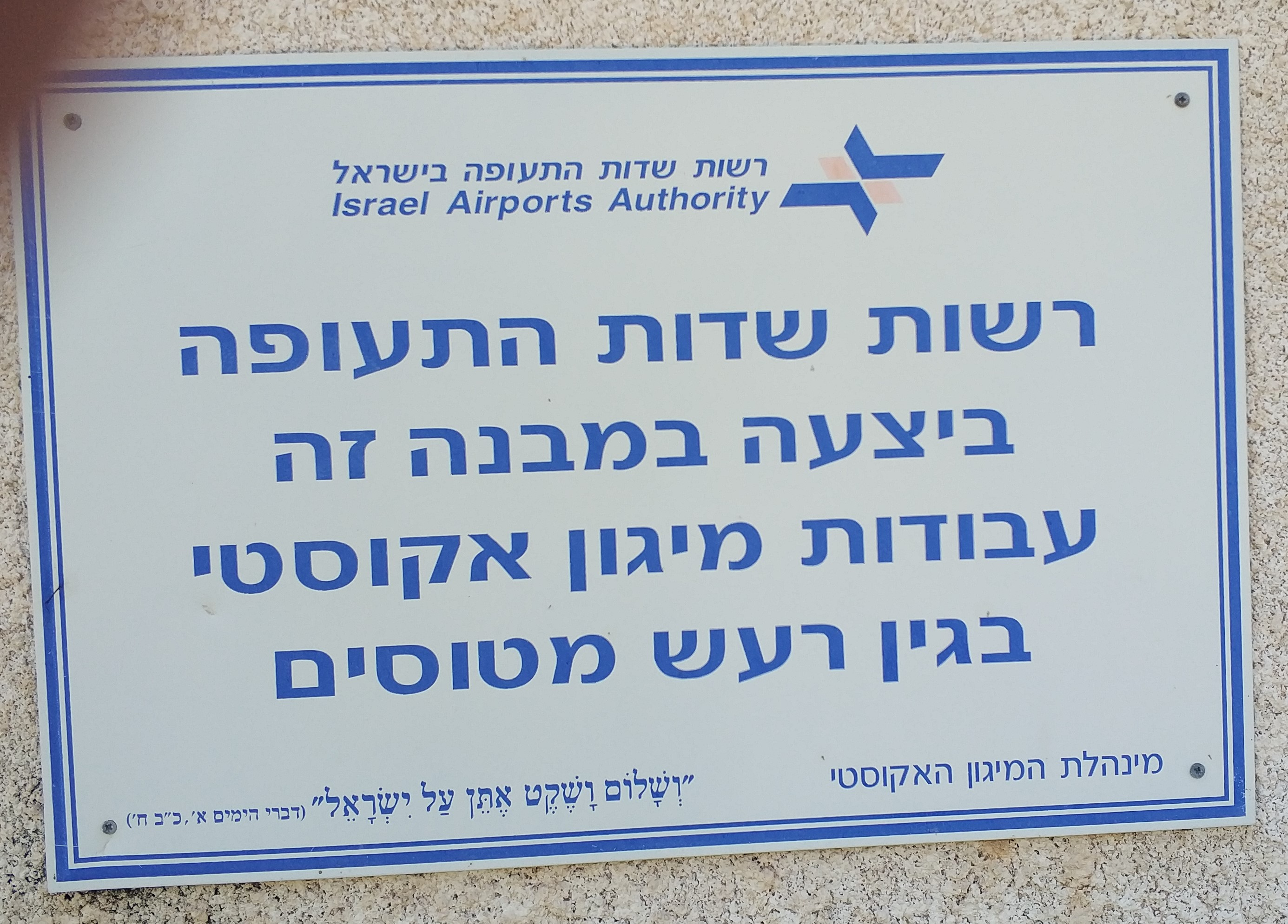 עבודות בידוד אקוסטי